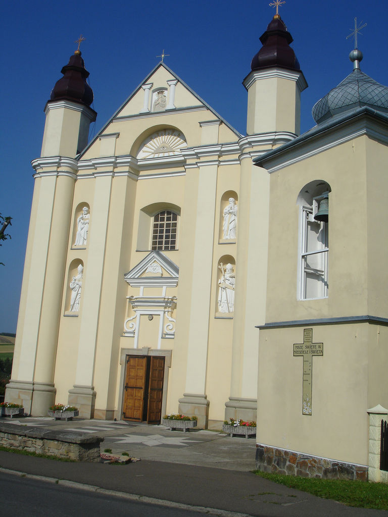 kościół pw. św. Mikołaja, Nowotaniec, 2006